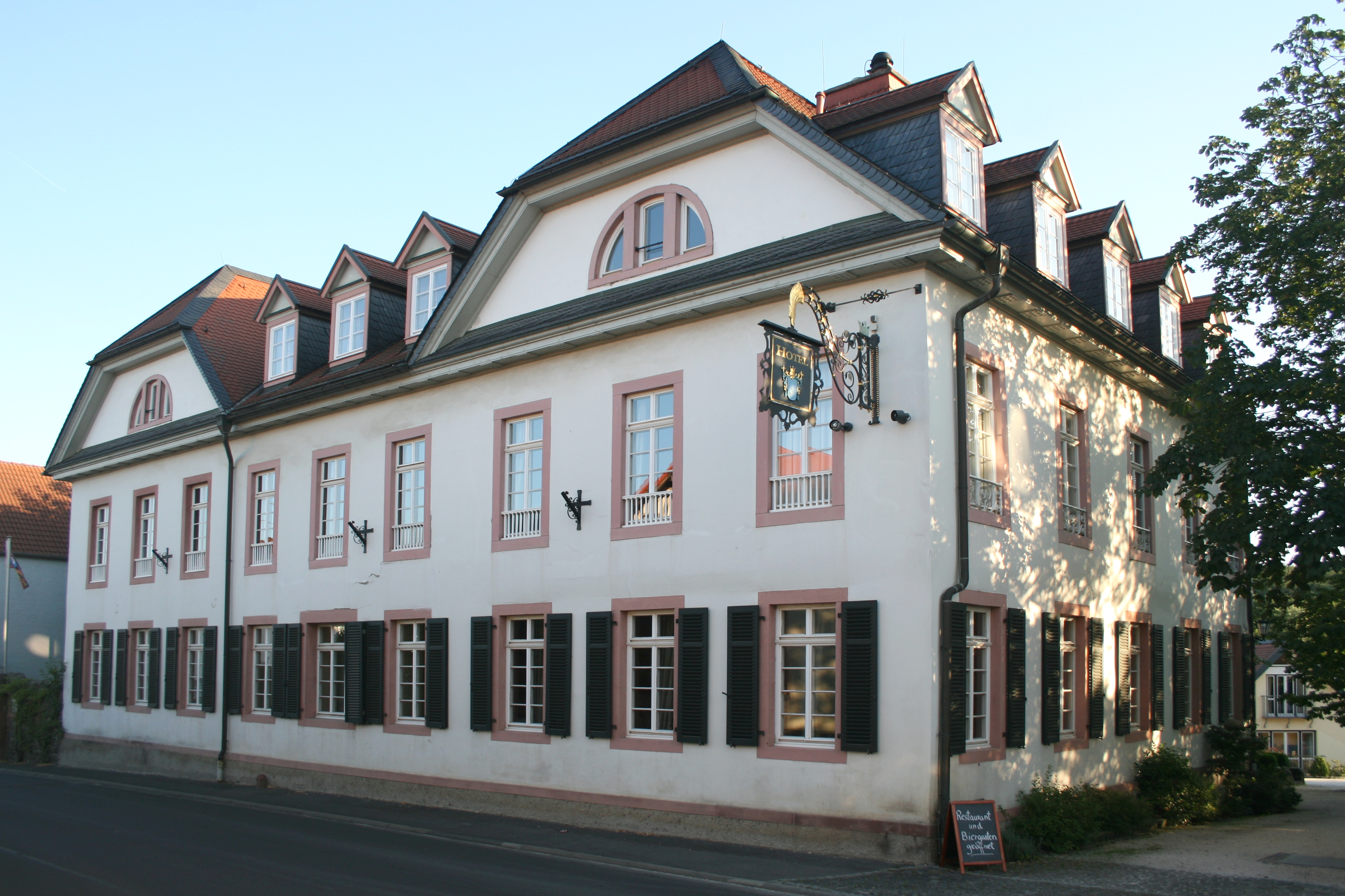 Ansicht des Löw’schen Schloss (Herrenhaus) in Steinfurth, Stadt Bad Nauheim, Wetteraukreis in Hessen, Straßenseite.